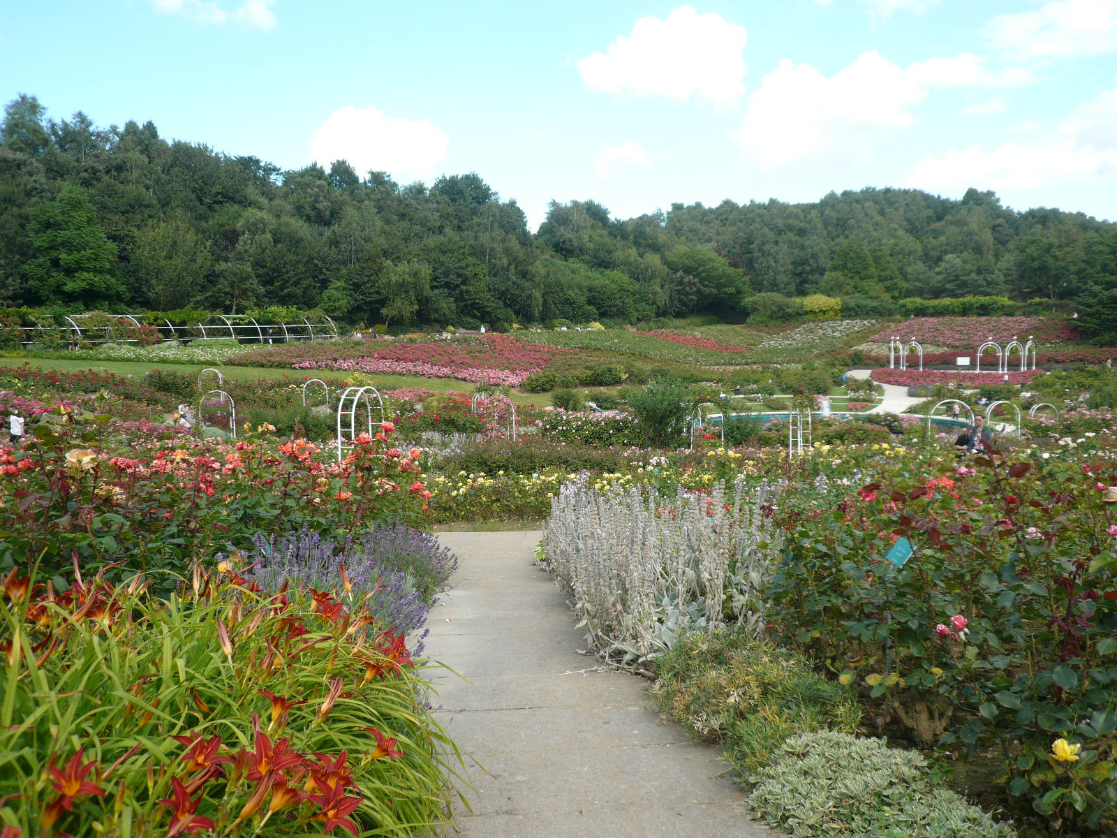 Roseraie de la colline aux oiseaux à Caen